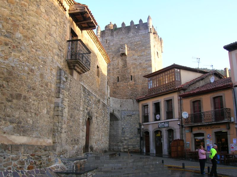 Castillo de Valdes Salas.